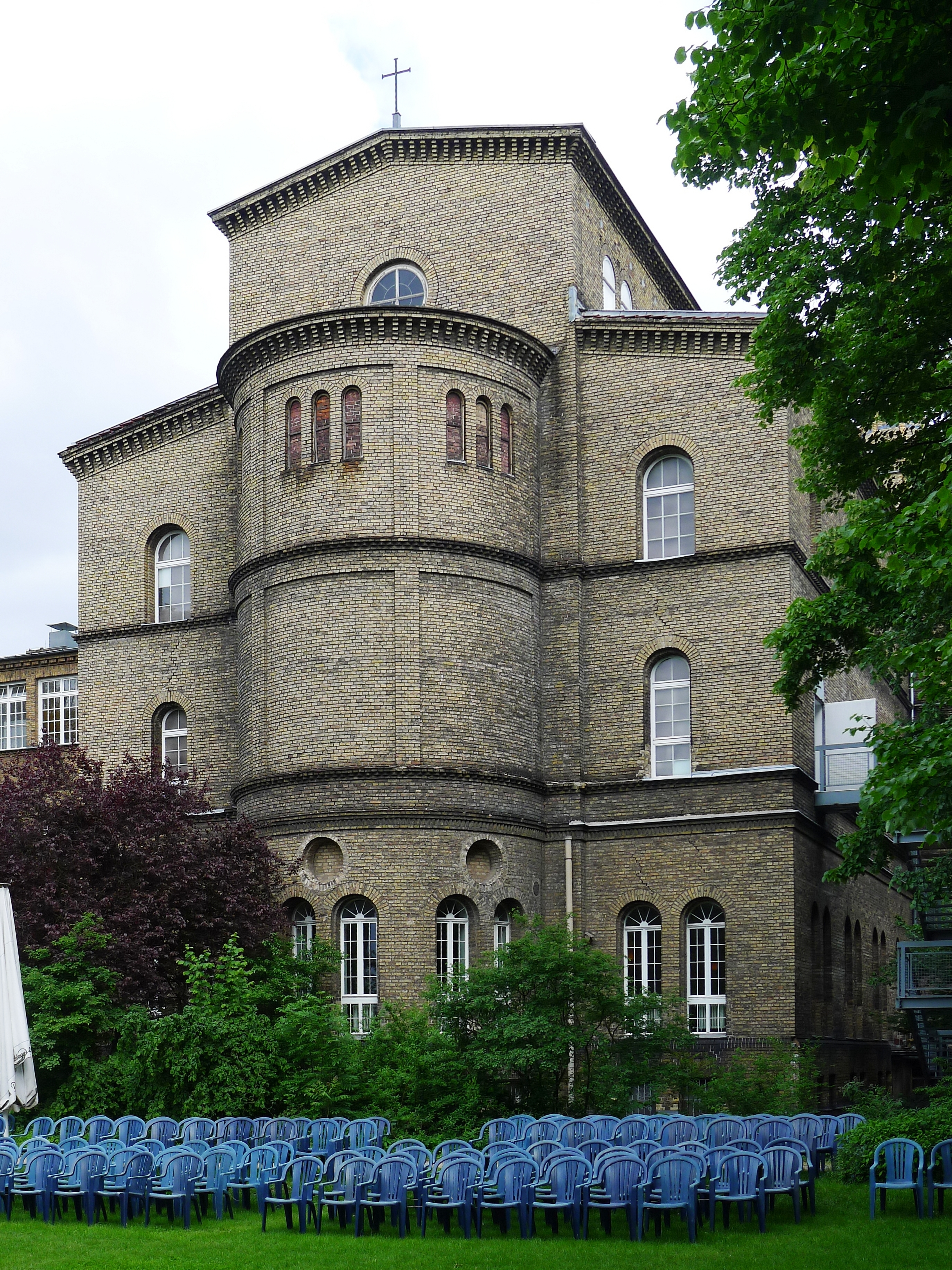 Blick auf die Apsis der Kirche